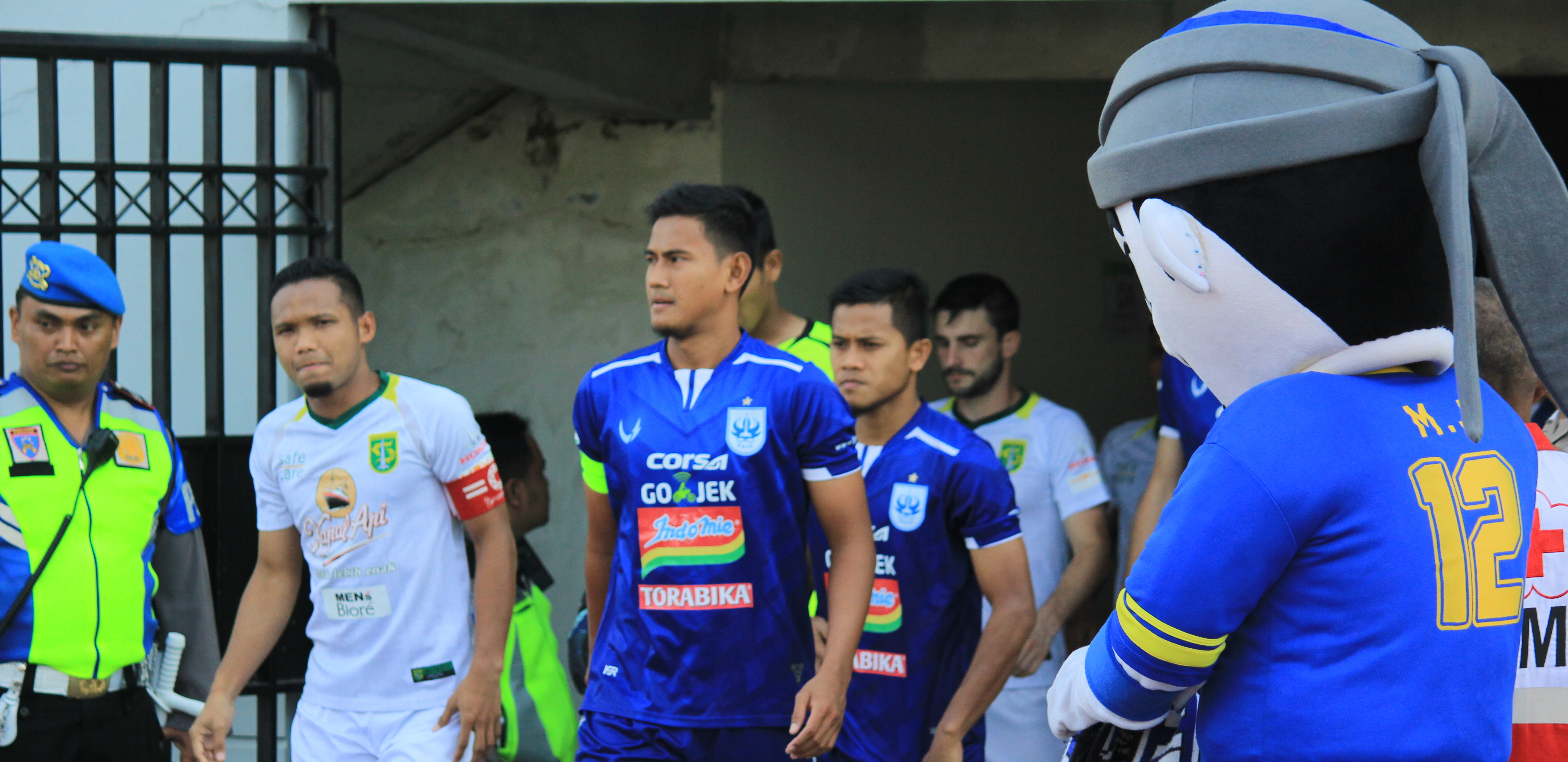 Haudi Abdillah (Capten) against Persebaya at Moch Soebroto Stadium